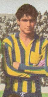 Sebastián Félix García, futbolista de Rosario Central durante la década de 1960.